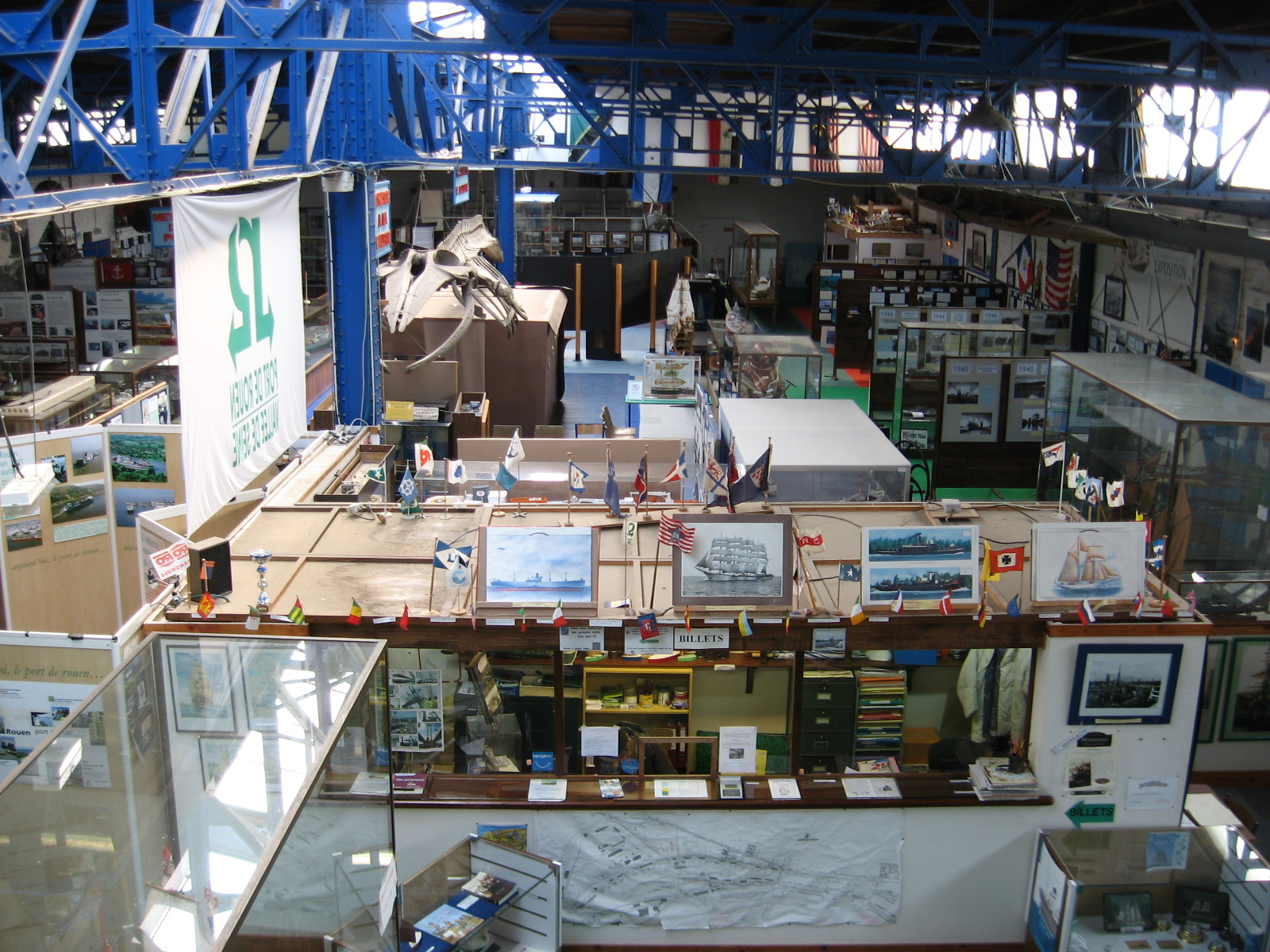 Vue générale du musée maritime de Rouen